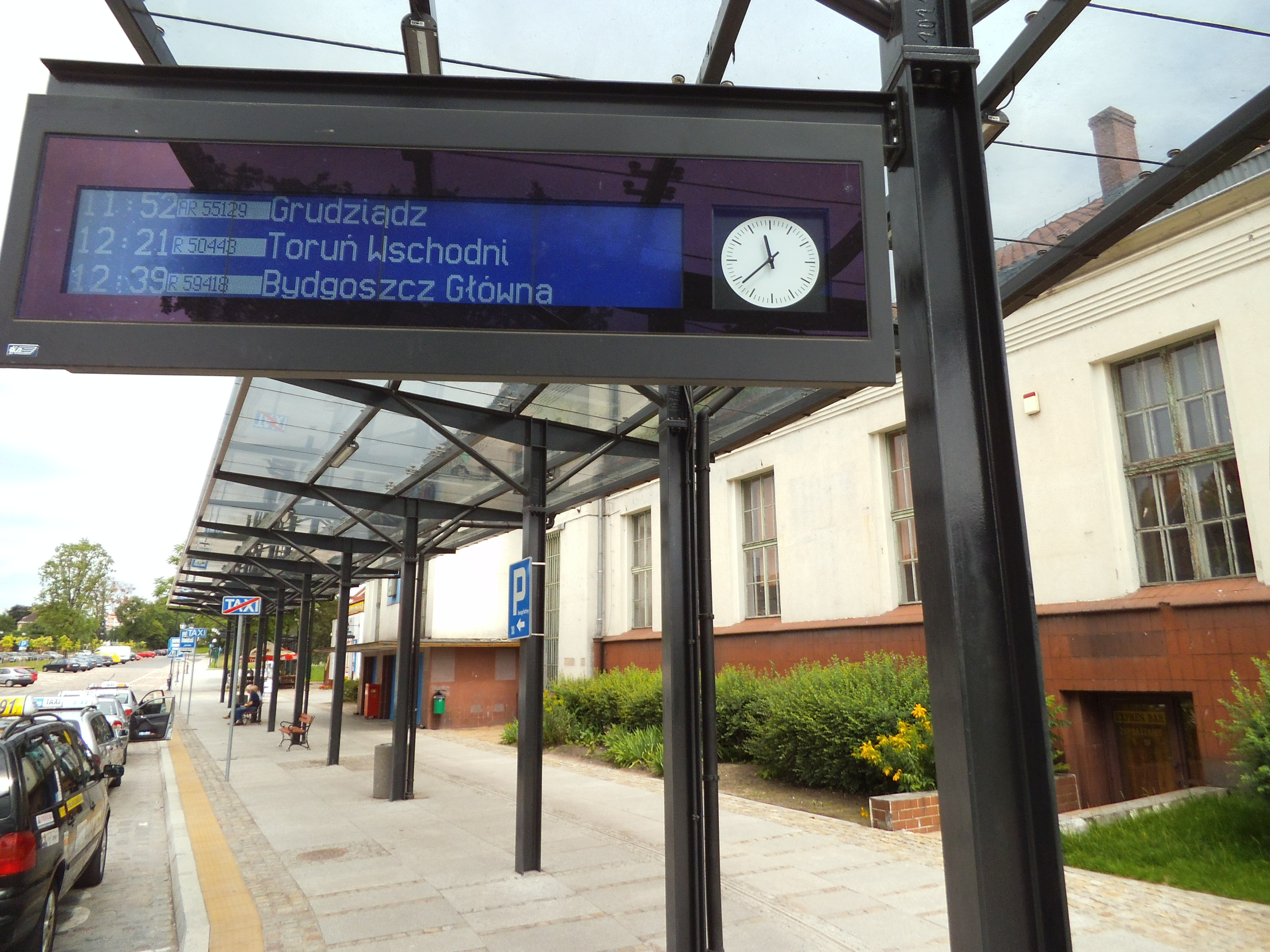 Toruń Miasto25